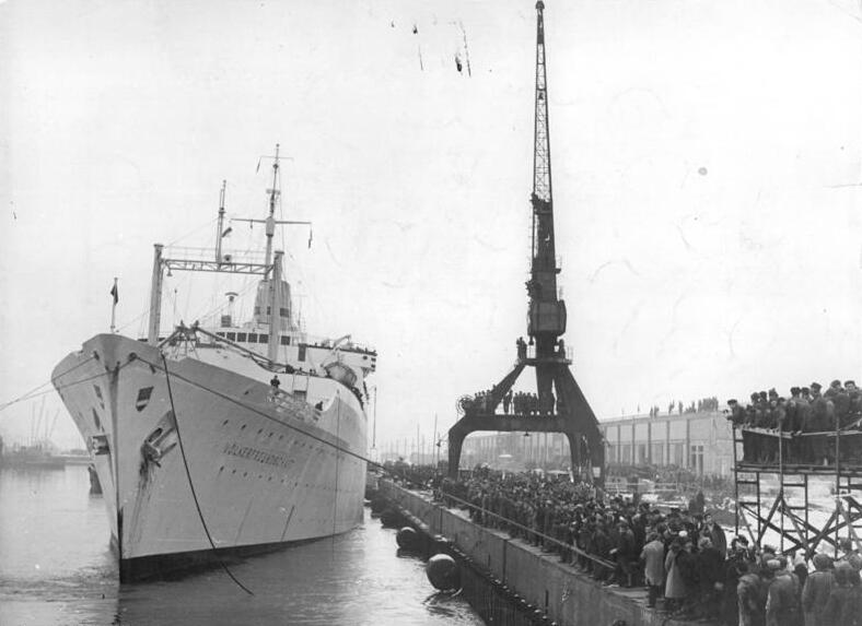 Zentralbild Mellahn-24.2.1960 Rostock: MS "Völkerfreundschaft" zur ersten Ferienreise ins Mittelmeer verabschiedet. Das 12.400 Tonnen große FDGB-Uraluberschiff "Völkerfreundschaft", das aus Mitteln der Steckenpferdbewegung erworben wurde, nahm am 24.2.1960 die ersten 500 Passagiere für die Jungfernreise des Schiffes ins Mittelmeer an Bord. UBz: Viele hundert Werktätige aus den Betrieben der Werftstadt und ebenso viele Erbauer des künftig größten DDR-Hafens säumten die Kaianlagen, als das Kommando "Leinen los" und "Fahrt frei" für MS "Völkerfreundschaft" erklang.